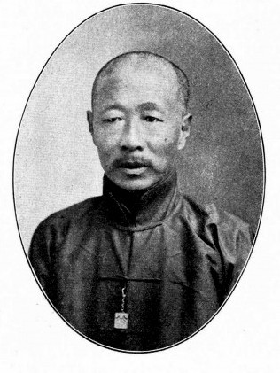 中文（台灣）: 王鳳翥議員